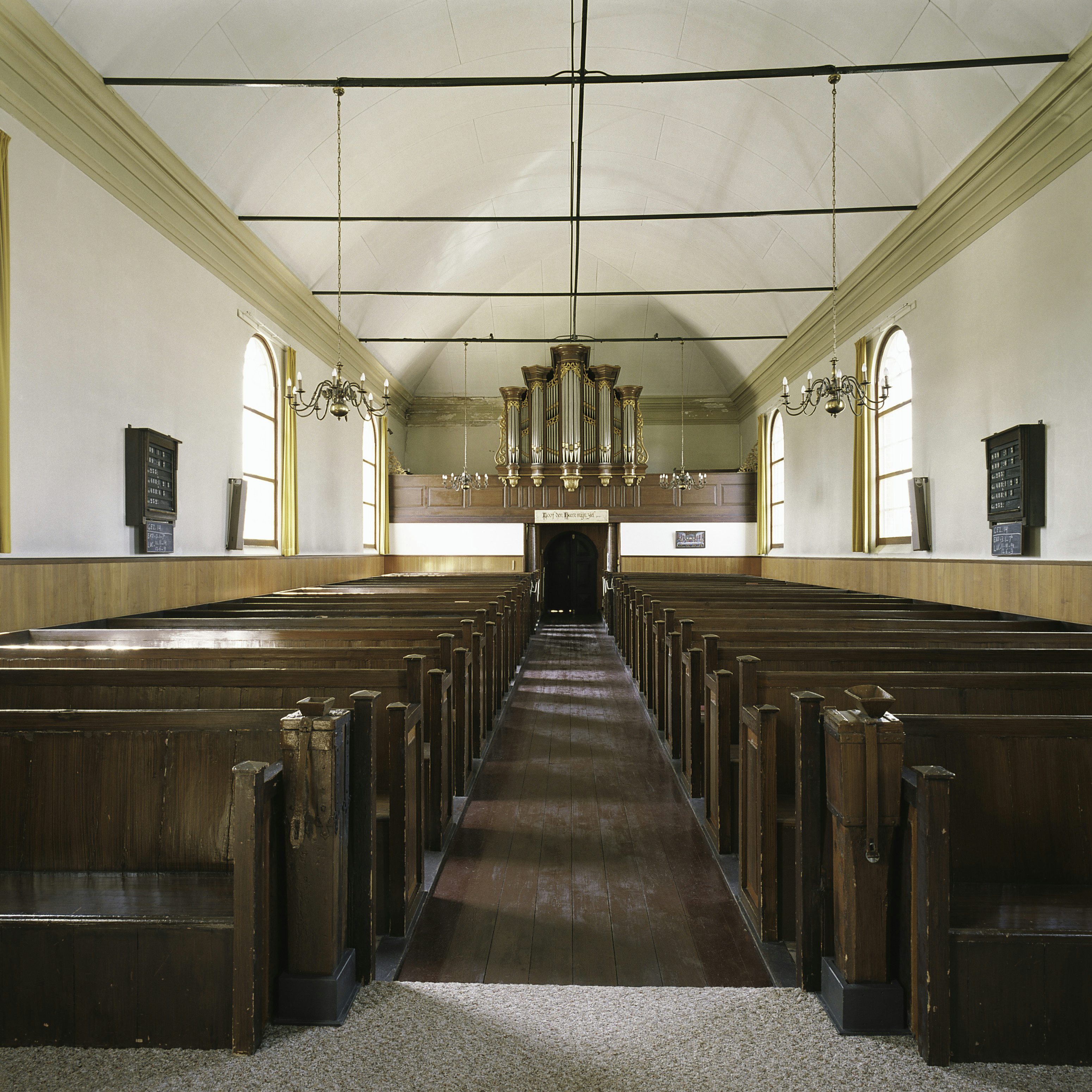 Nederlands Hervormde Kerk: Interieur, overzicht richting het westen met orgel en kerkbanken